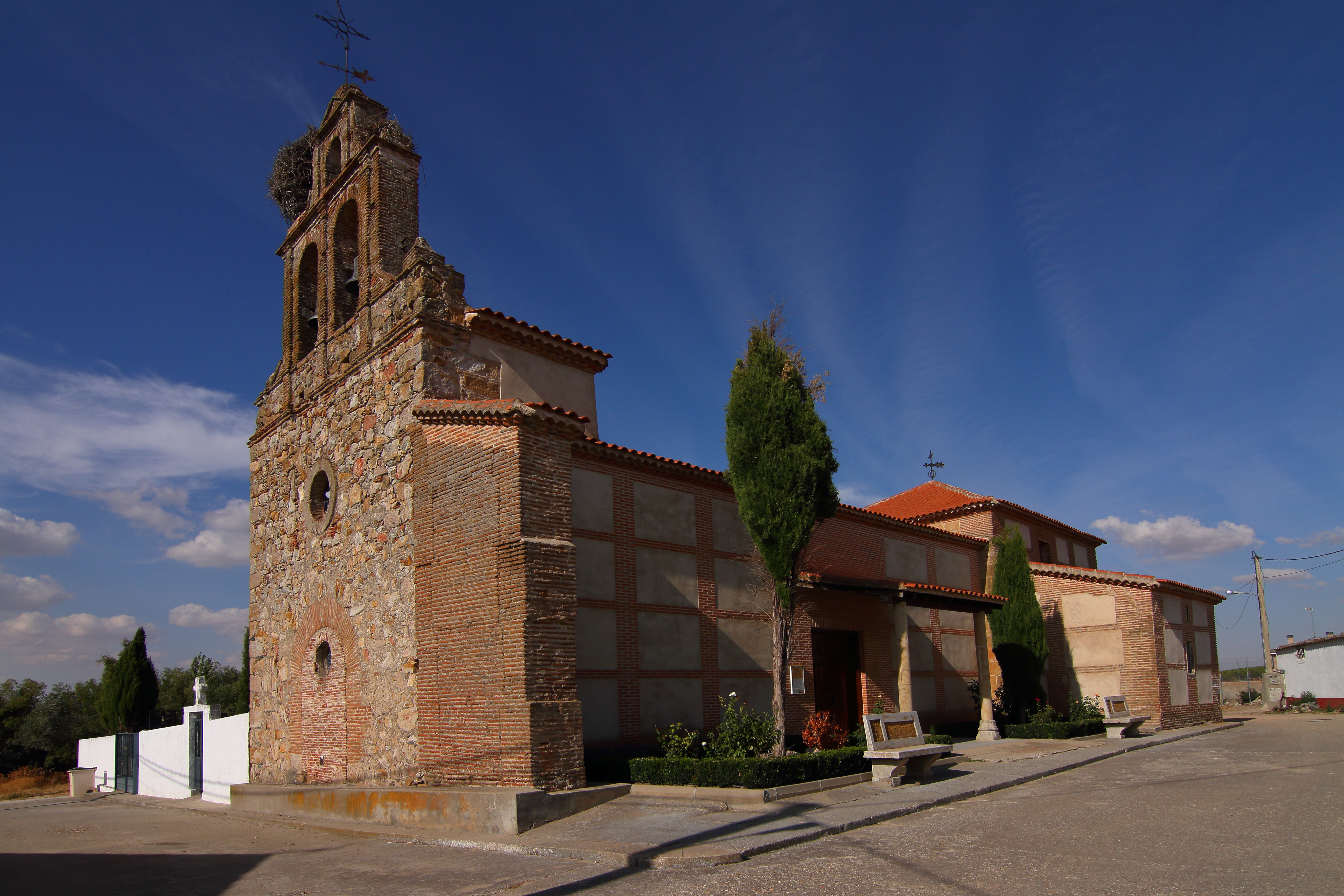 Iglesia parroquial de Alconada